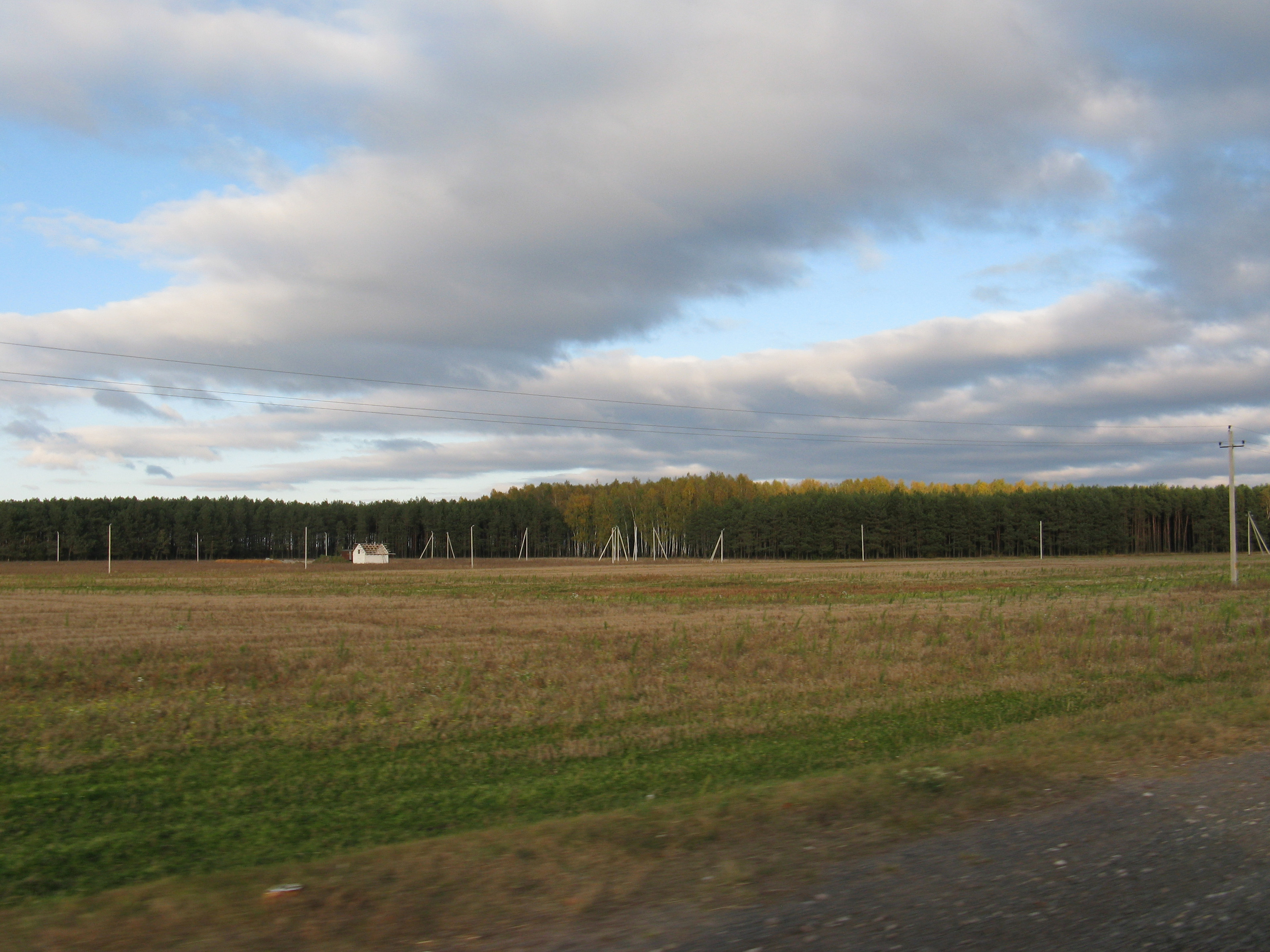 Желтые деревья - первая буква слова "ЛЕНИН"